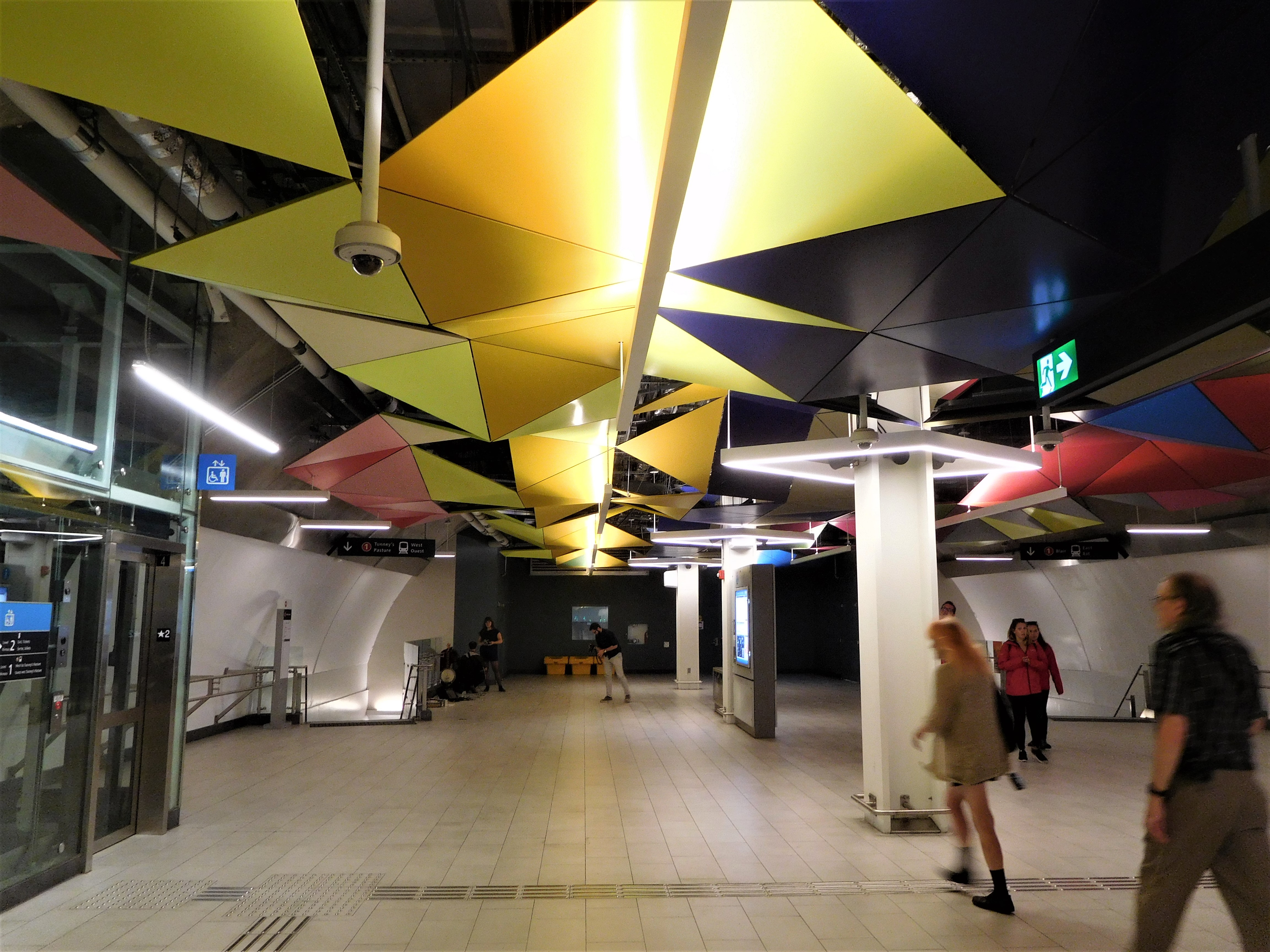 À l'intérieur de la station Parlement